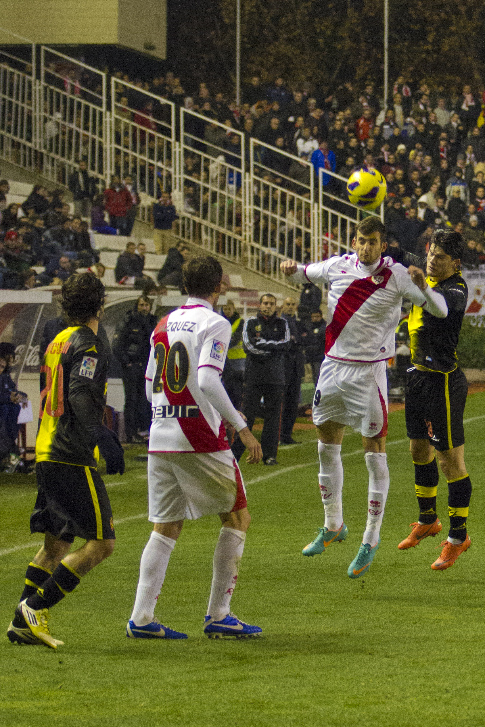 rayo vallecano vs real zaragoza